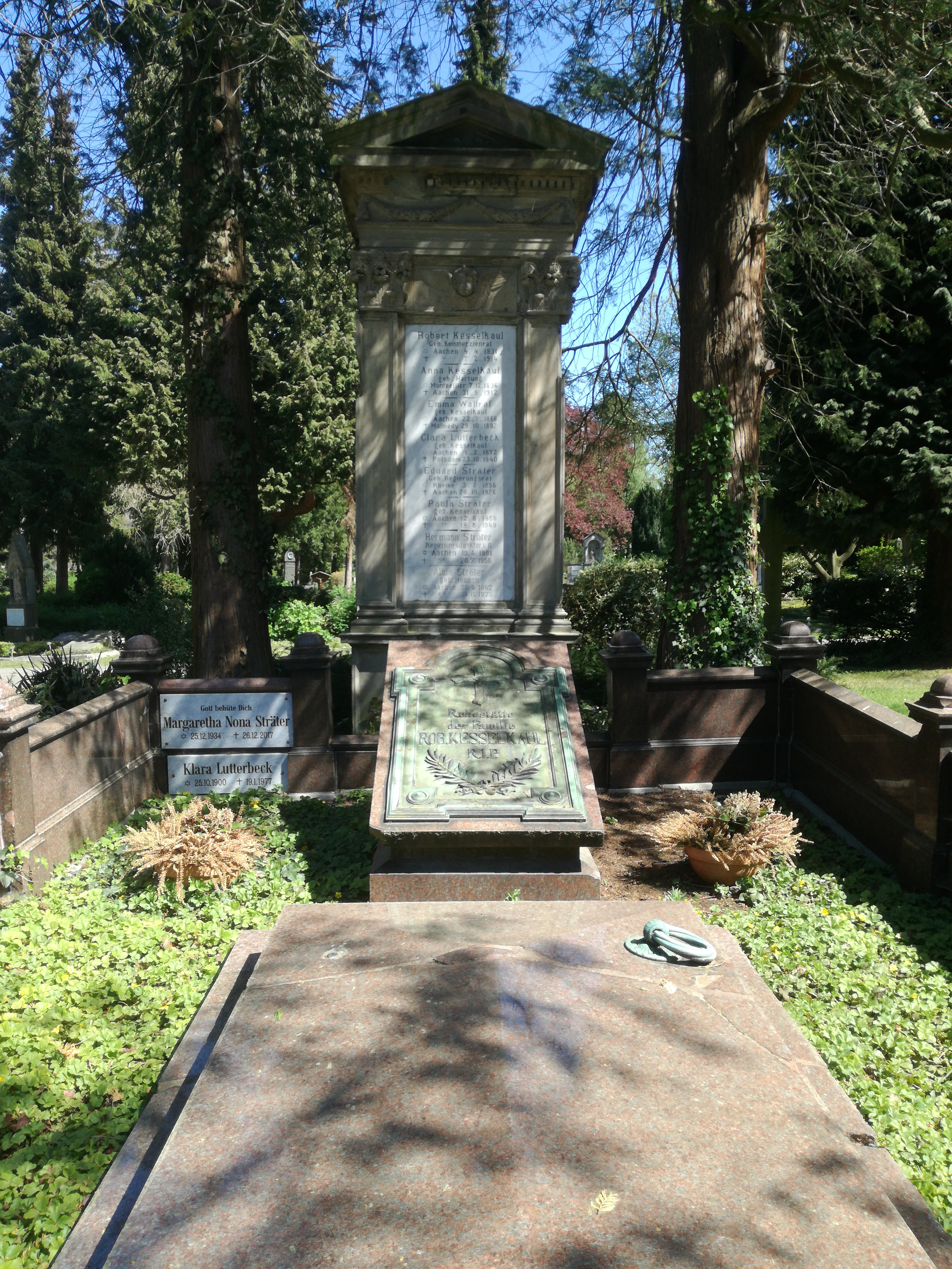 Grabstätte Kesselkaul-Sträter, Ostfriedhof Aachen